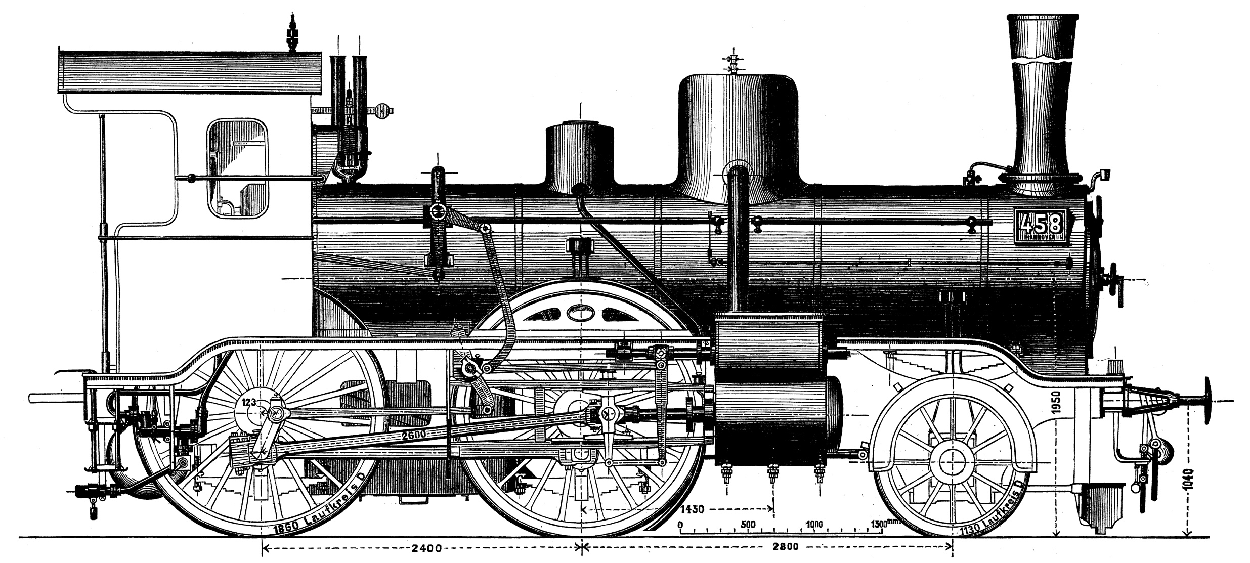 Verbund-Schnellzug-Lokomotive der Königlichen Eisenbahndirektion in Hannover